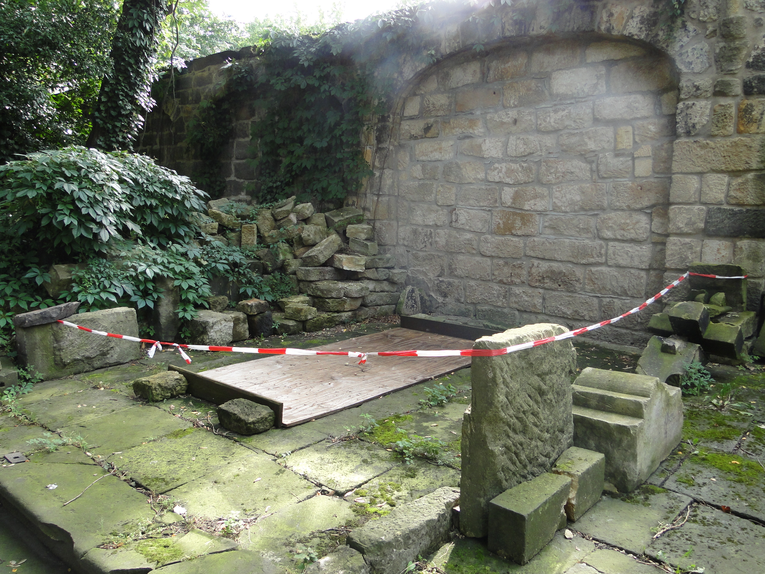 verfallene Gruft von Justus Friedrich Güntz auf dem Eliasfriedhof in Dresden